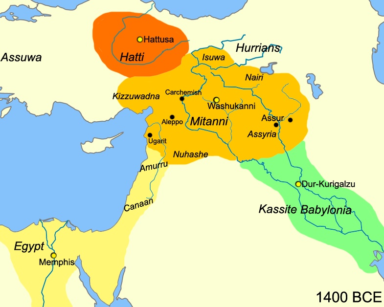 Map